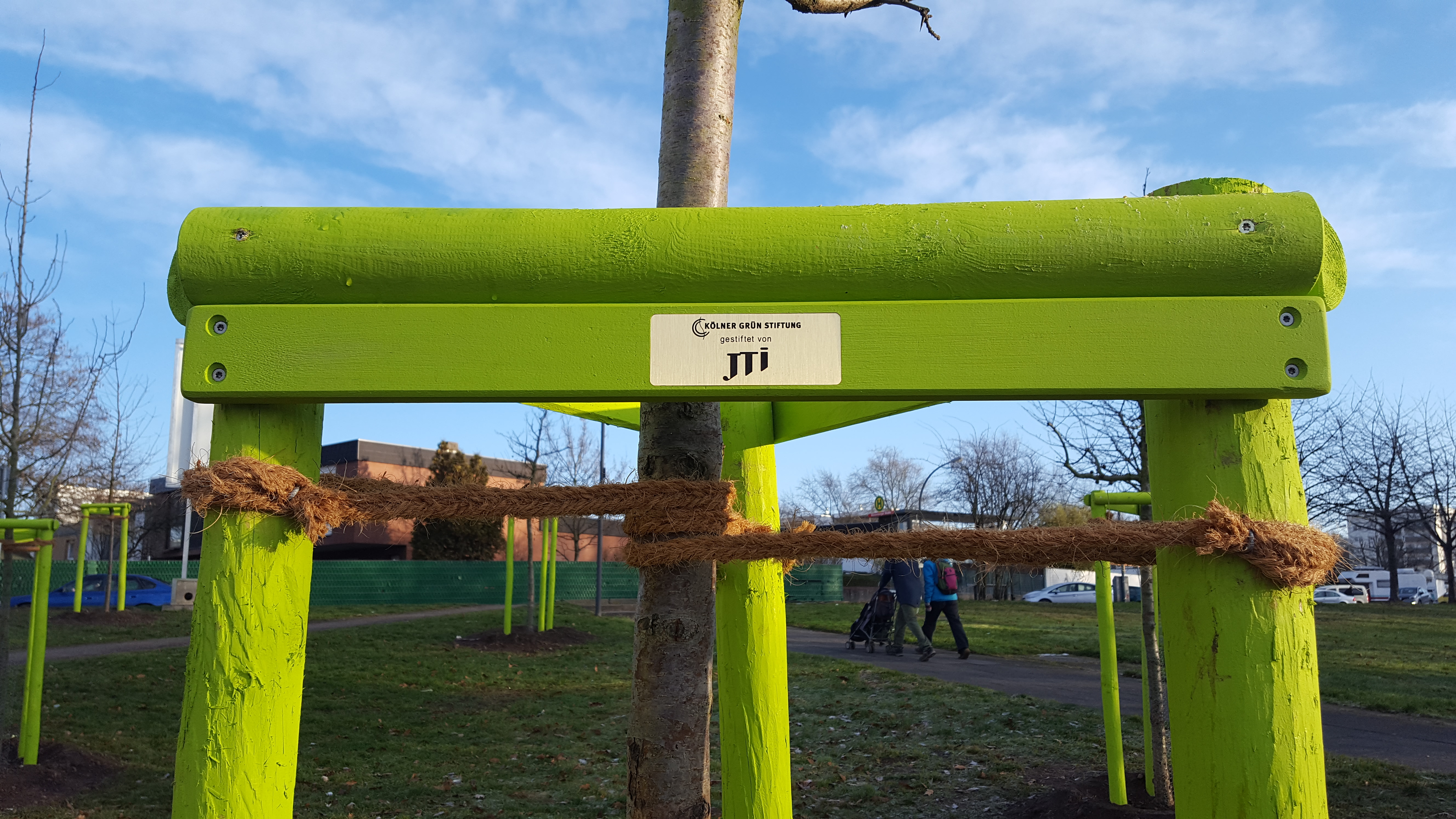 Spenderschild unserer Spenderbäume